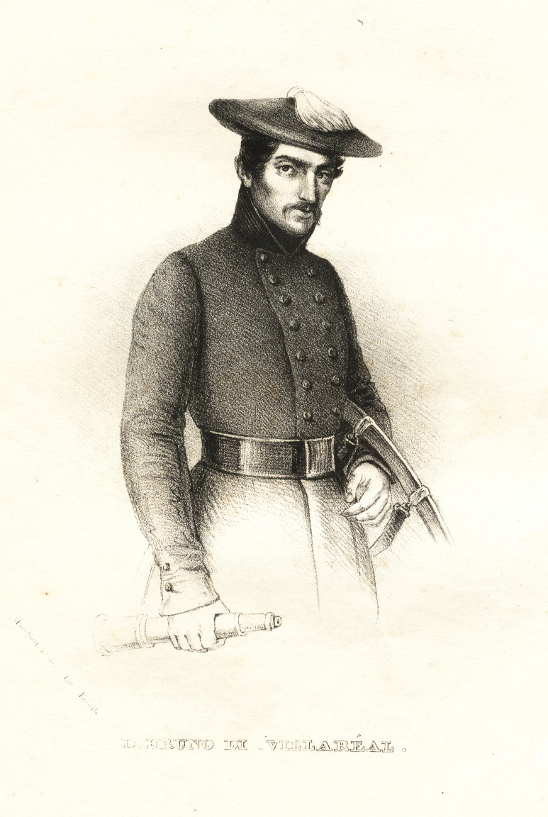 Bruno Villarreal. Dibujo de Isidoro Magués. "Don Carlos e i suoi difensori". Firenze 1837